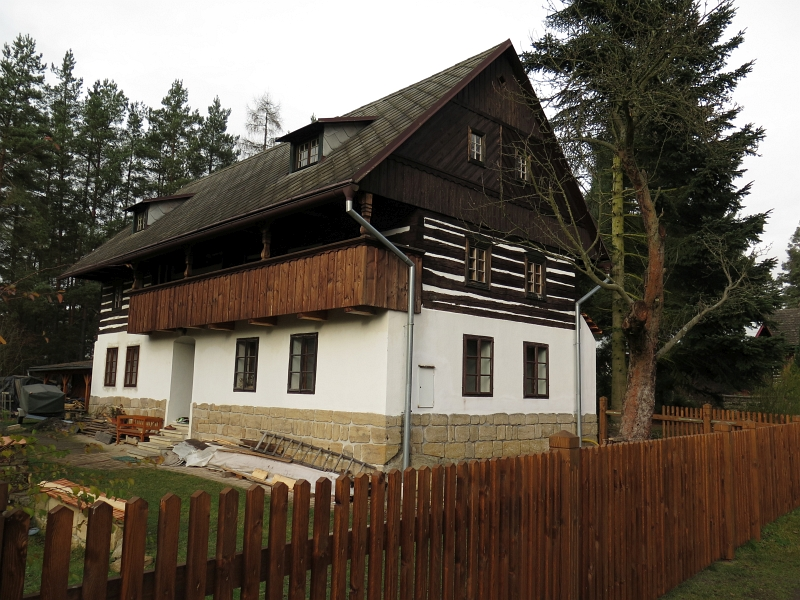 Venkovský dům (Vlkov), Vlkov 5, Vlkov (Dobřeň).